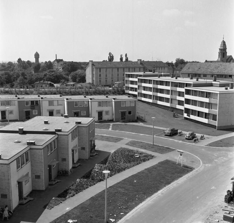 Wohnungsbau: Nürnberg-Zollhaus